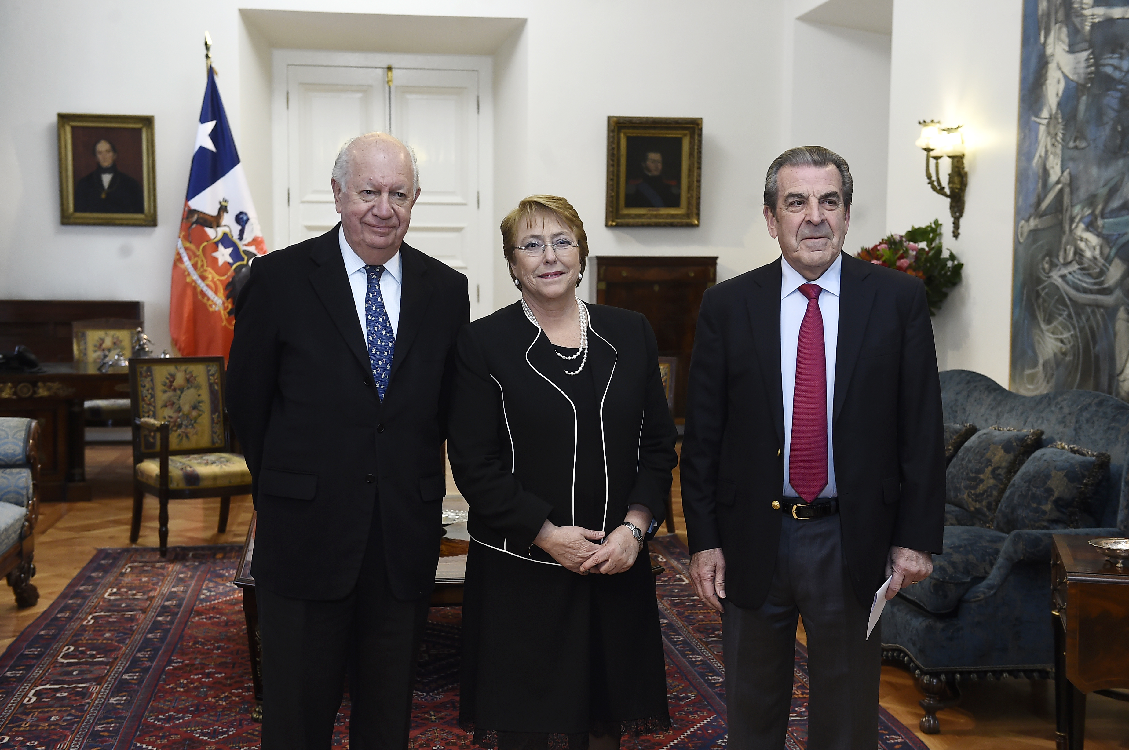 Gobierno de Chile